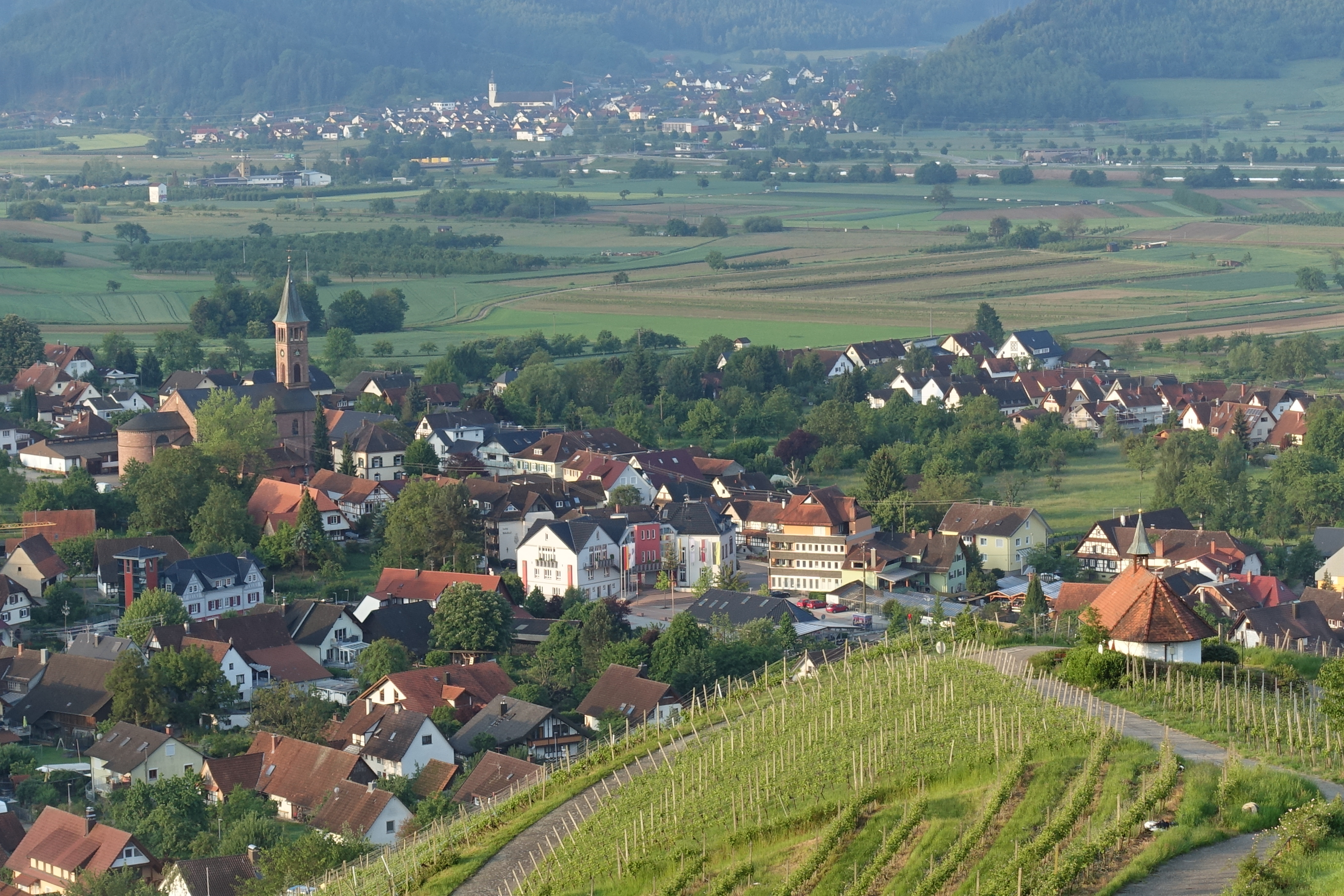 Blick auf Ohlsbach von oberhalb des Ortes